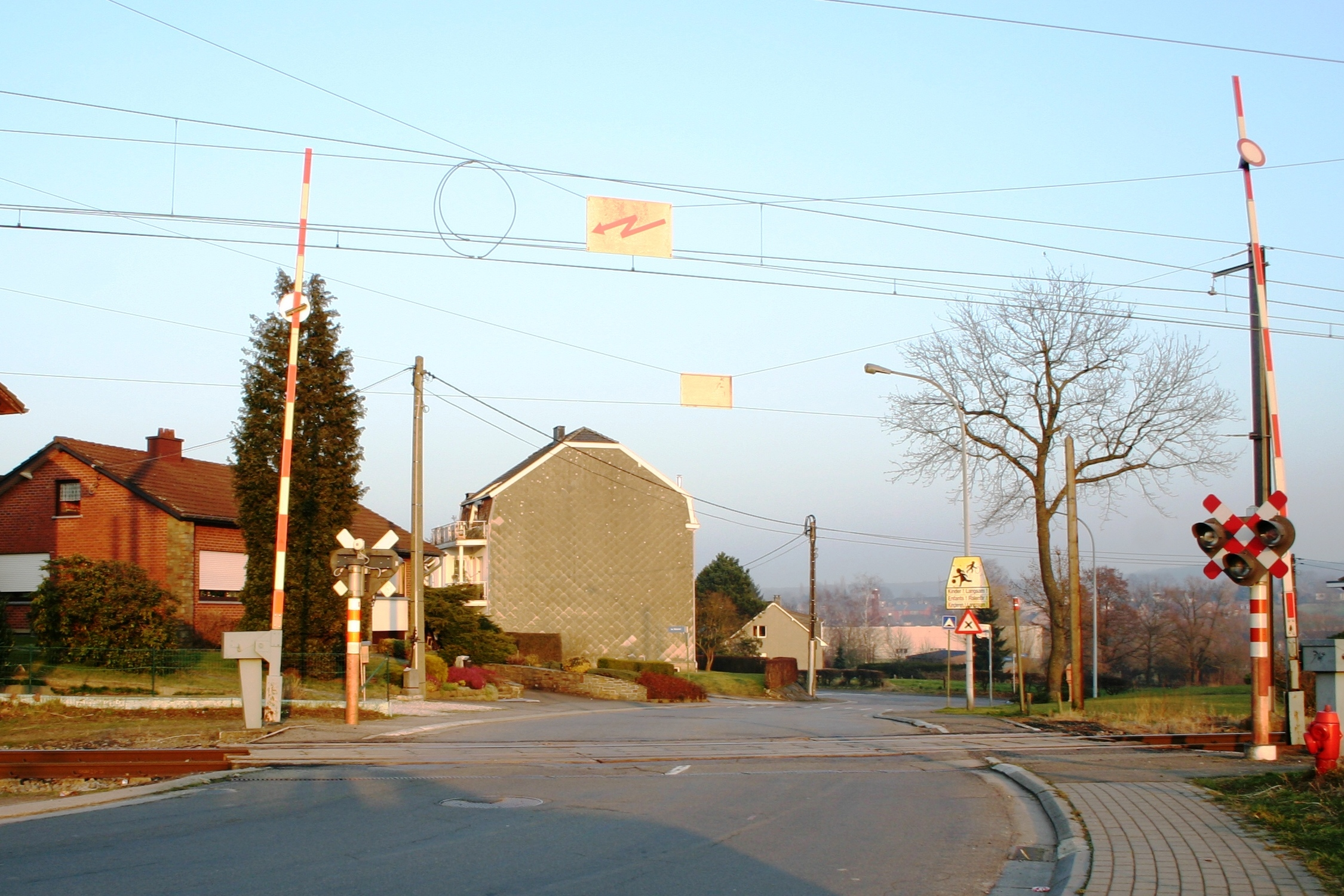 Barrière vun der Linn 49 zu Kettenis am Buschbergerweg.